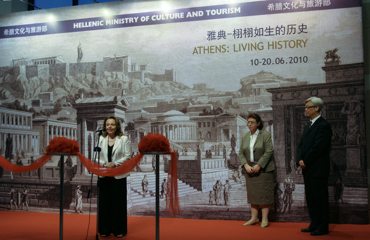 Εγκαίνια Έκθεσης ΥΠΠΤΟ με θέμα «Αθήνα: Μια Ζωντανή Ιστορία» σε Βιβλιοθήκη Σαγκάης, στα πλαίσια συμμετοχής χώρας μας σε WEXPO. Την εκδήλωση προσφώνησε η Γενική Πρόξενος, Μαρία Σαράντη, τονίζοντας ότι η έκθεση ενισχύει τη συμμετοχή Ελλάδος στην WEXPO, συνάδει με θέμα της «Better City Better City» και προωθεί συνεργασία Ελλάδος-Κίνας στον τομέα πολιτισμού και Τουρισμού» Φωτογραφία: Υπουργείο Εξωτερικών